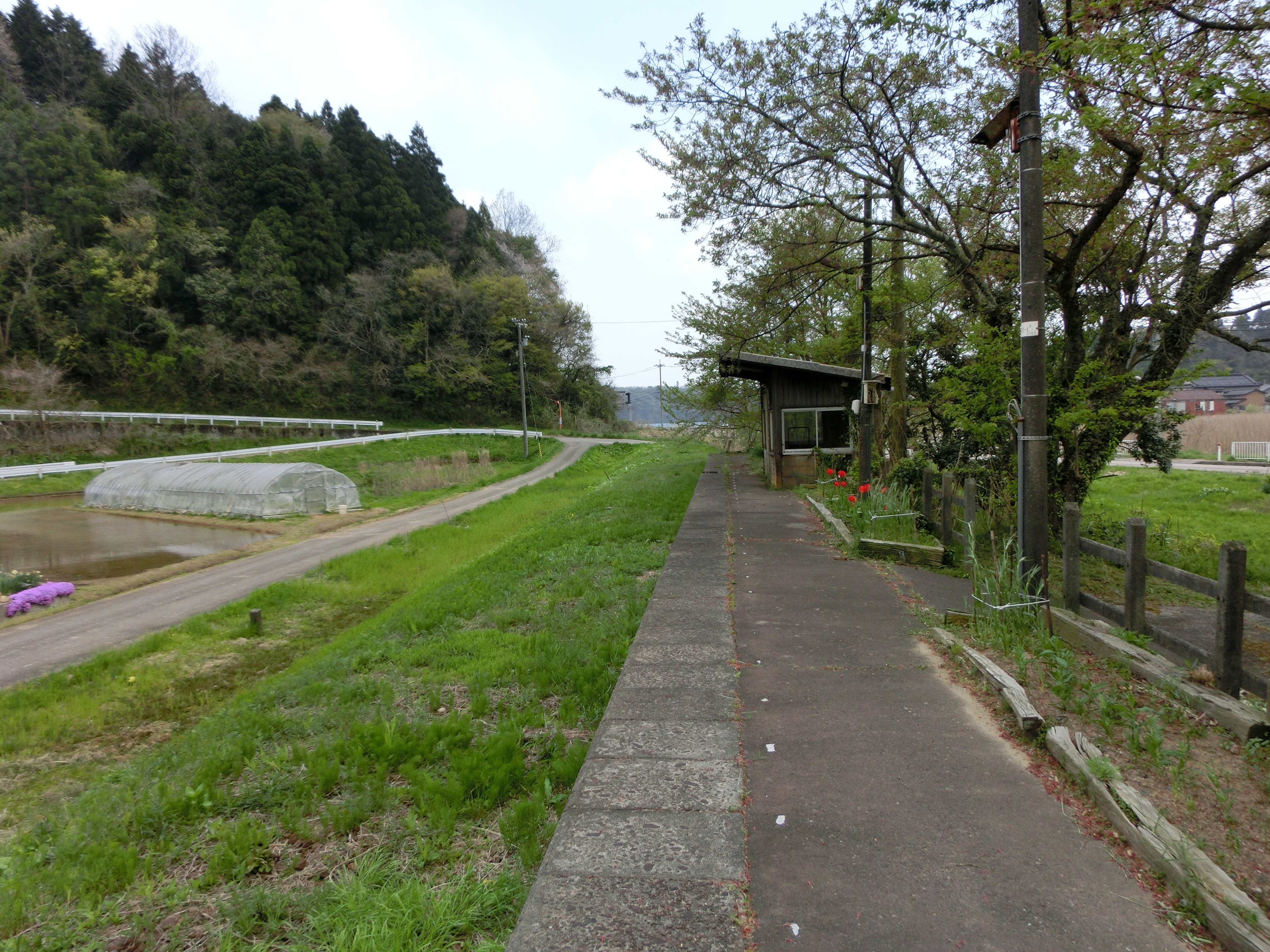 廃止後の中居駅ホームおよび待合室